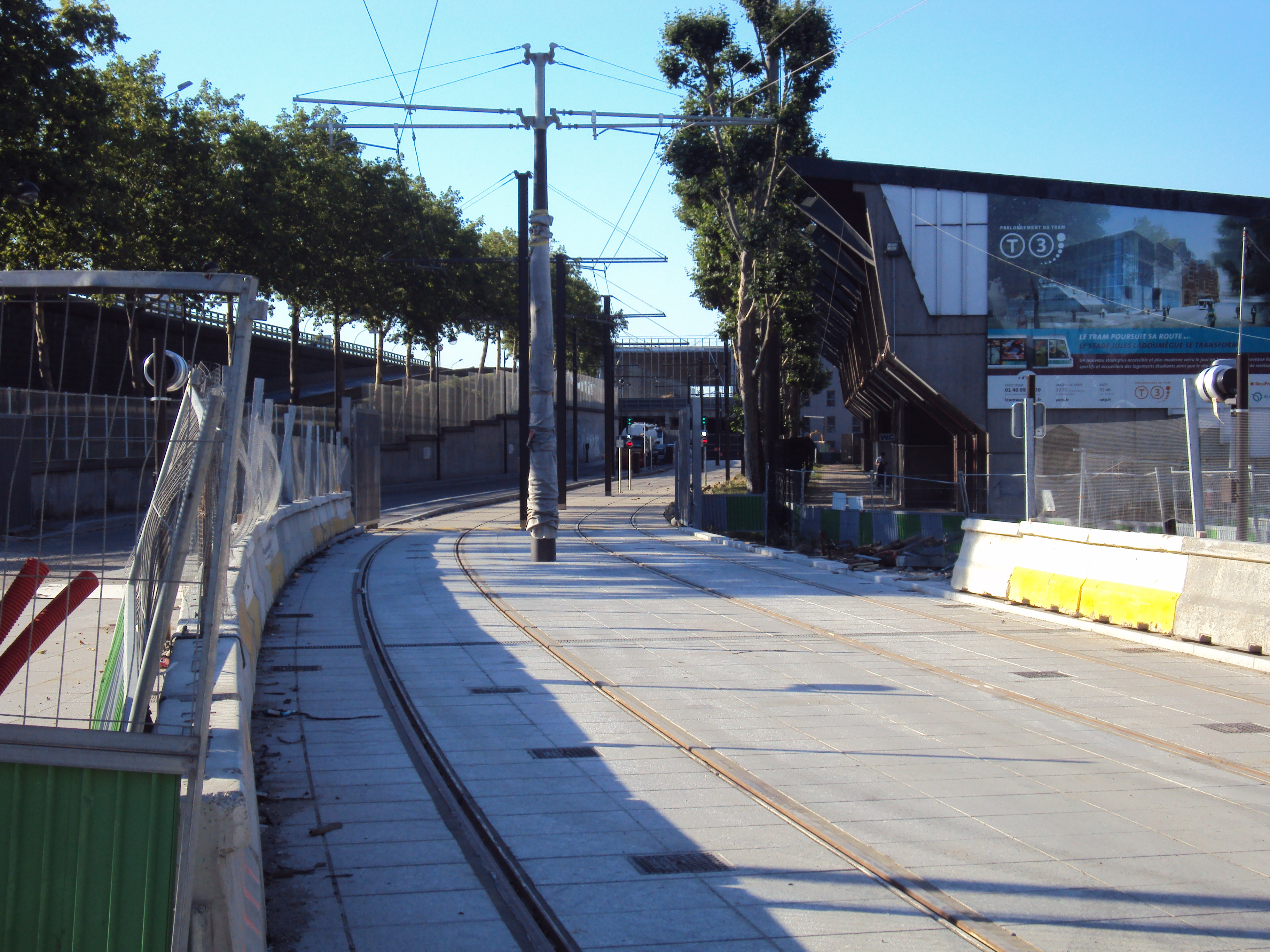 Raccordement vers l'atelier d'entretien a Pantin